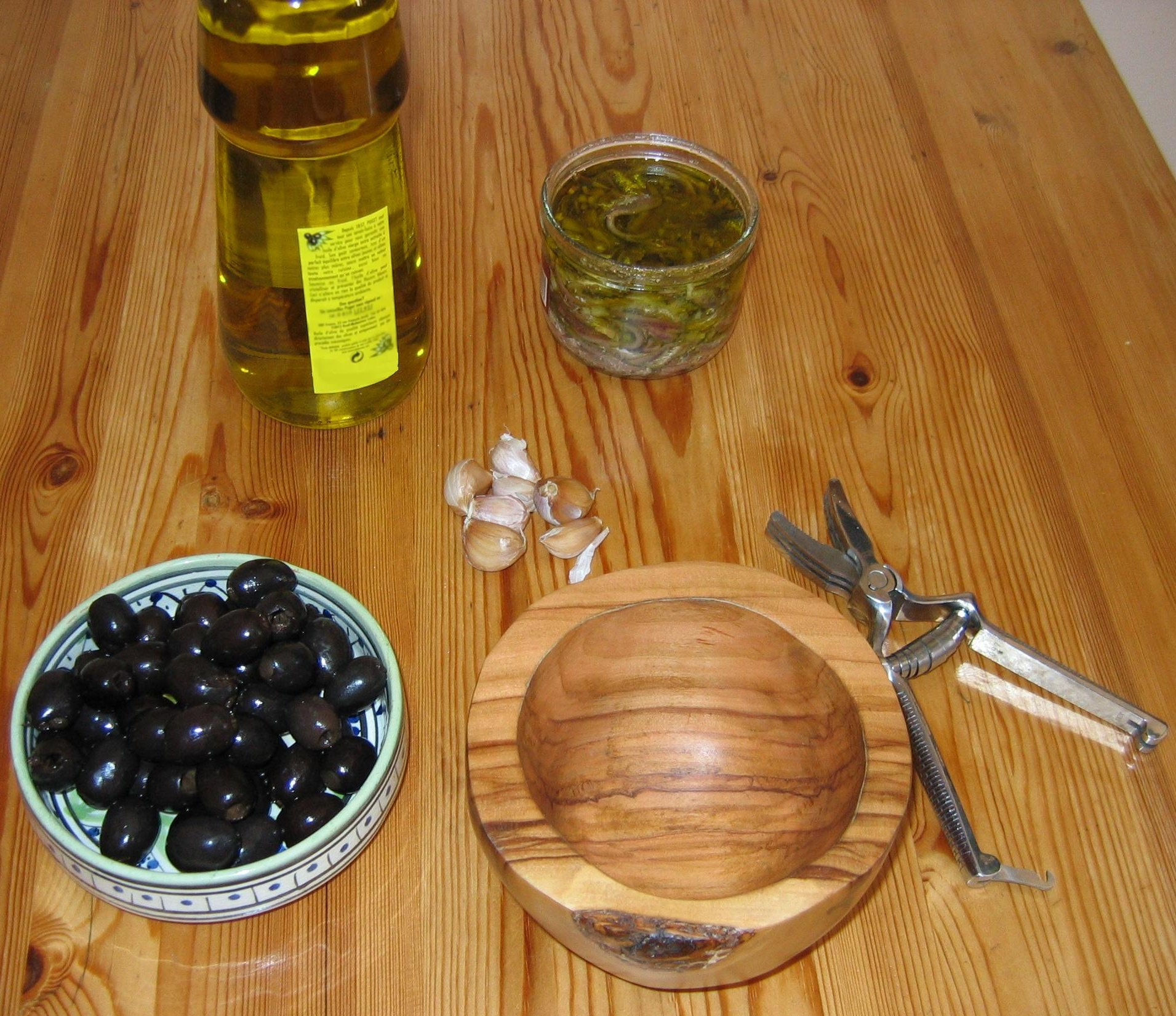 Image illustrant anchoïade. On y voit : Anchois Ail Olives noires Huile d'olive masticateur